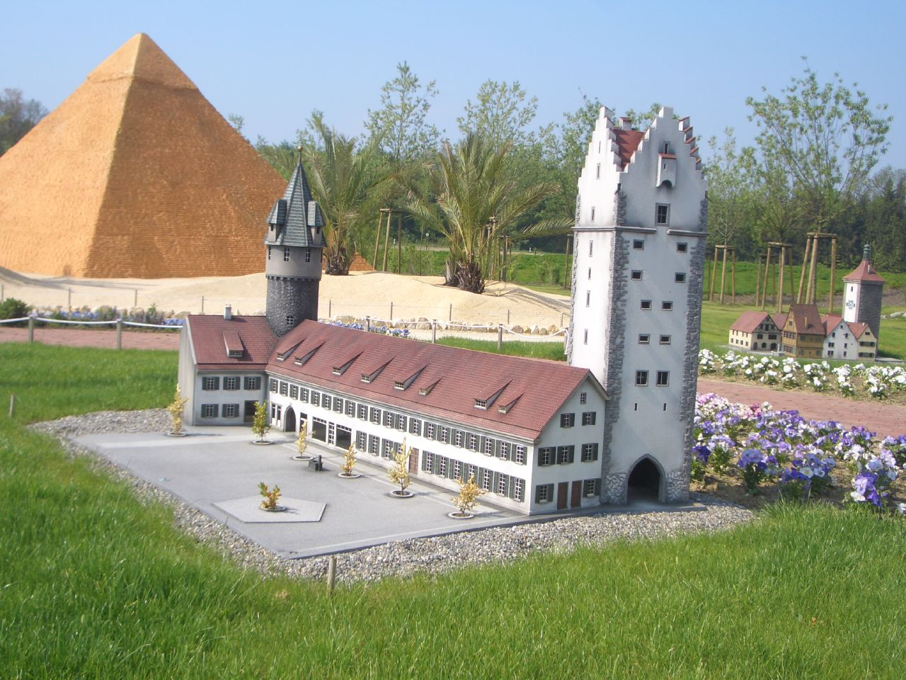 Meckenbeuren, Mini Mundus Bodensee, Nachbildung von Frauentor, Bauhütte und Grünem Turm in Ravensburg